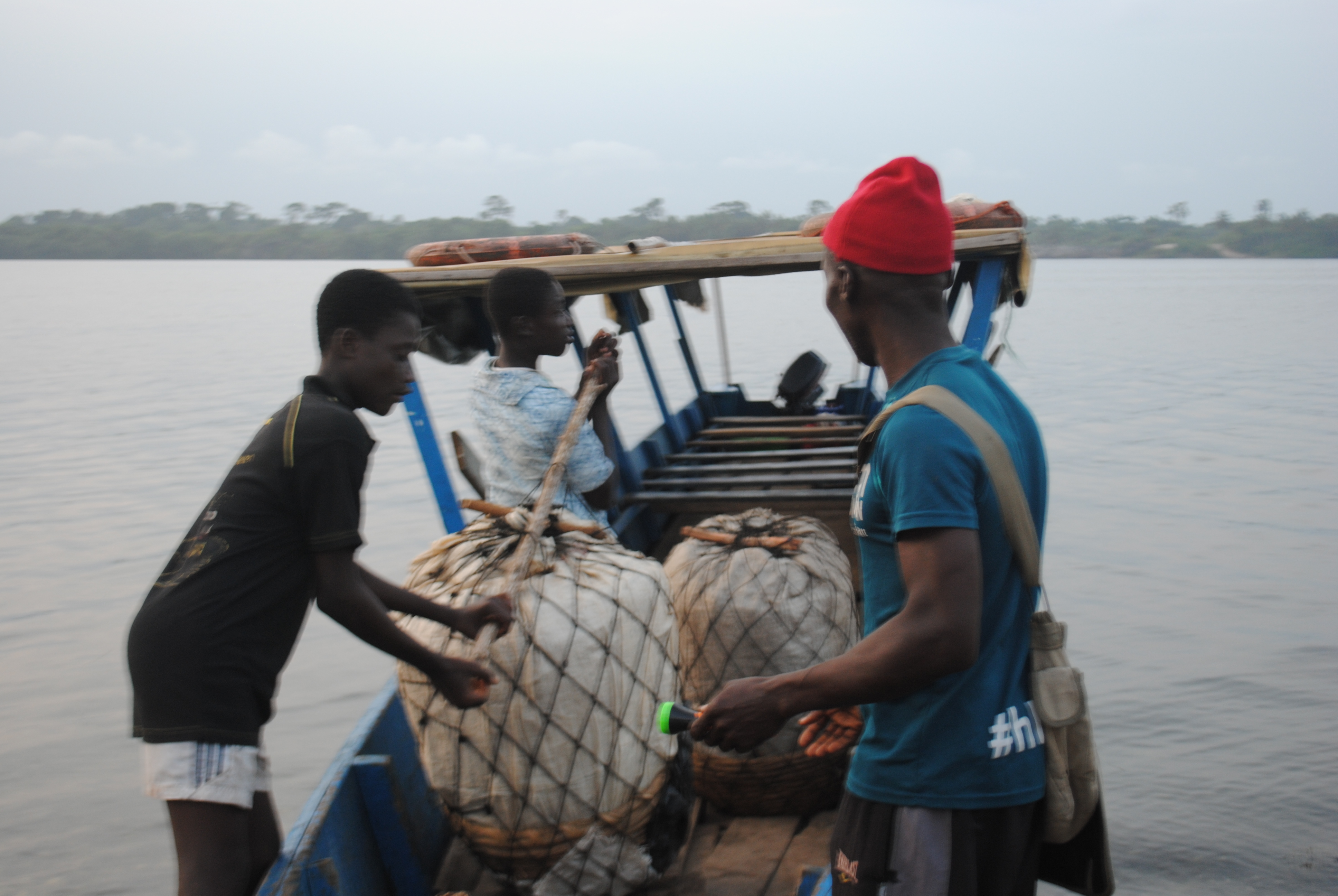 Des chargeurs de bateau de transport à Grand-Lahou, en Côte d'Ivoire This is an image of "African people at work" from Ivory Coast